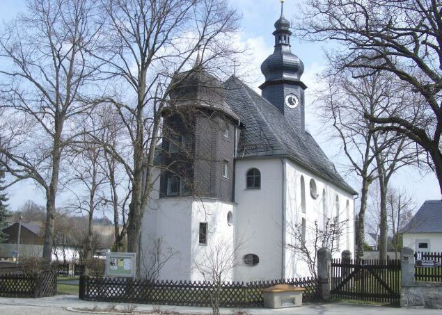 Die evangelisch-lutherische Pfarrkirche St. Simon und Judas in Issigau aus dem 15./16. Jahrhundert.